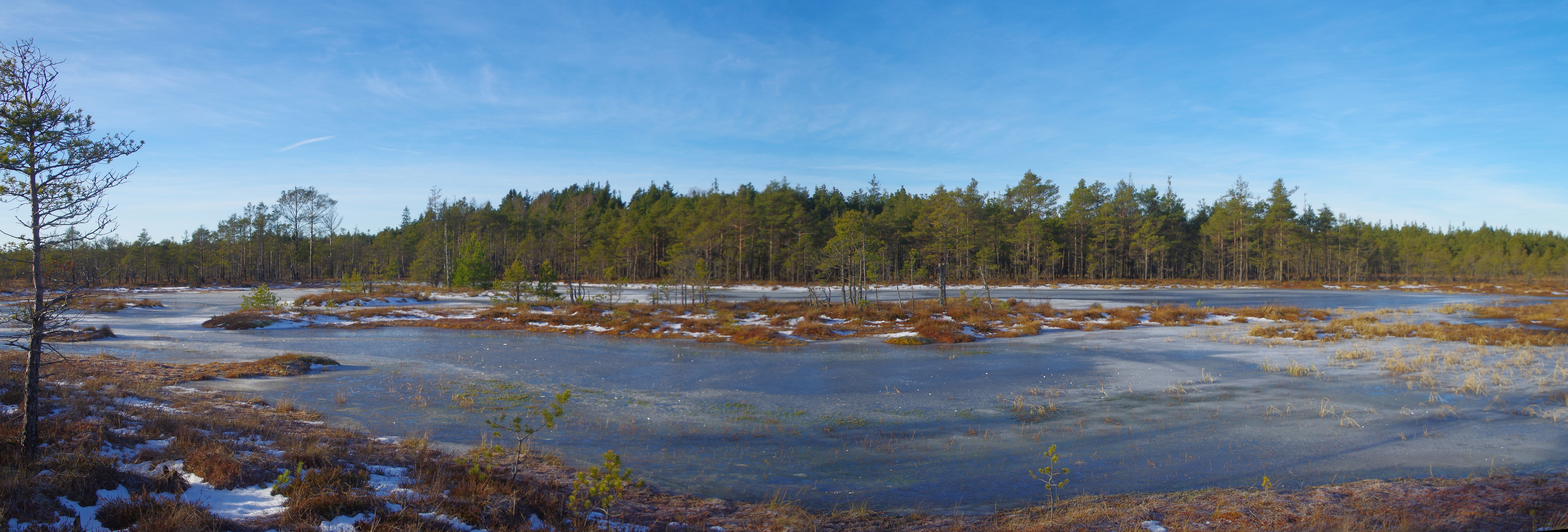 Männiku raba (ka Valdeku raba) on raba Harju maakonnas Saku vallas Männiku karjääri lähedal. Raba pindala on 901 ha. Raba eesvooluks on Katku oja ja Männiku karjäär.